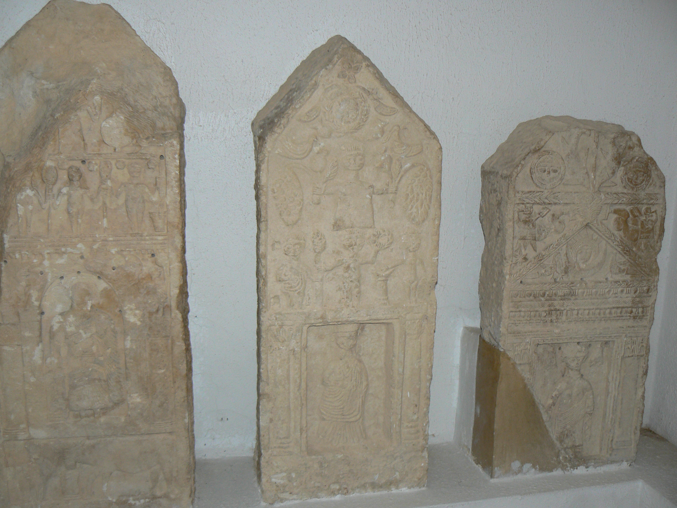 Stèles de type Ghorfa au musée de Makthar